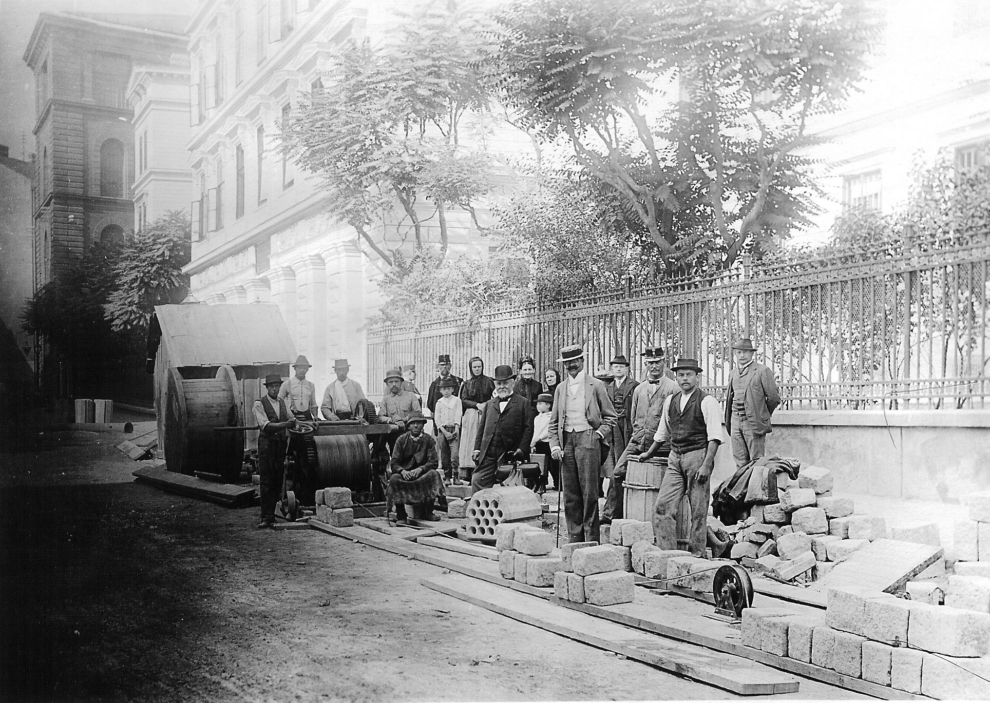 Gruppenaufnahme beim Kabeleinziehen vor OA Dr m HR Trauc, Aug 1898